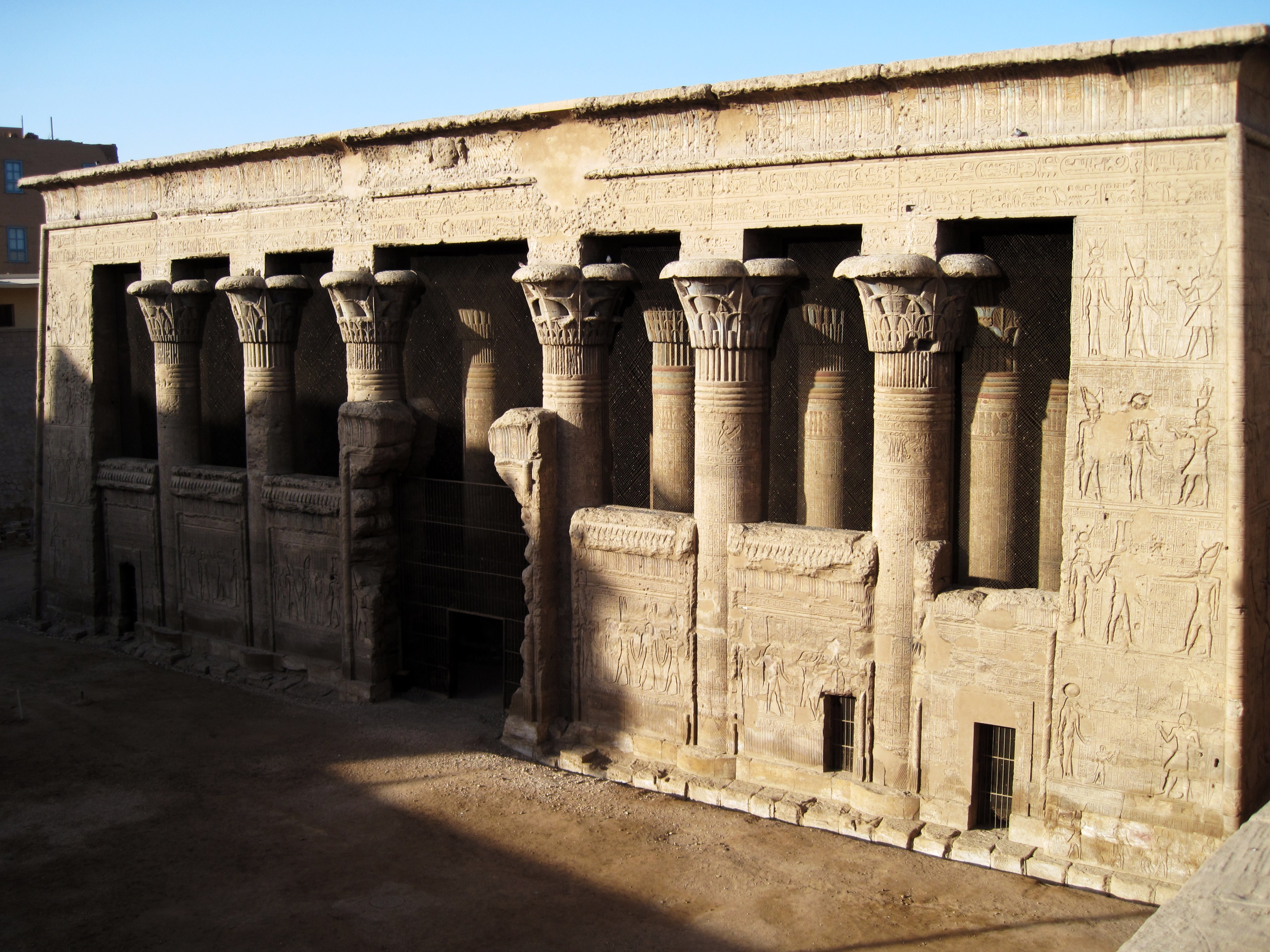 Chnum-Tempel in Esna, Ägypten